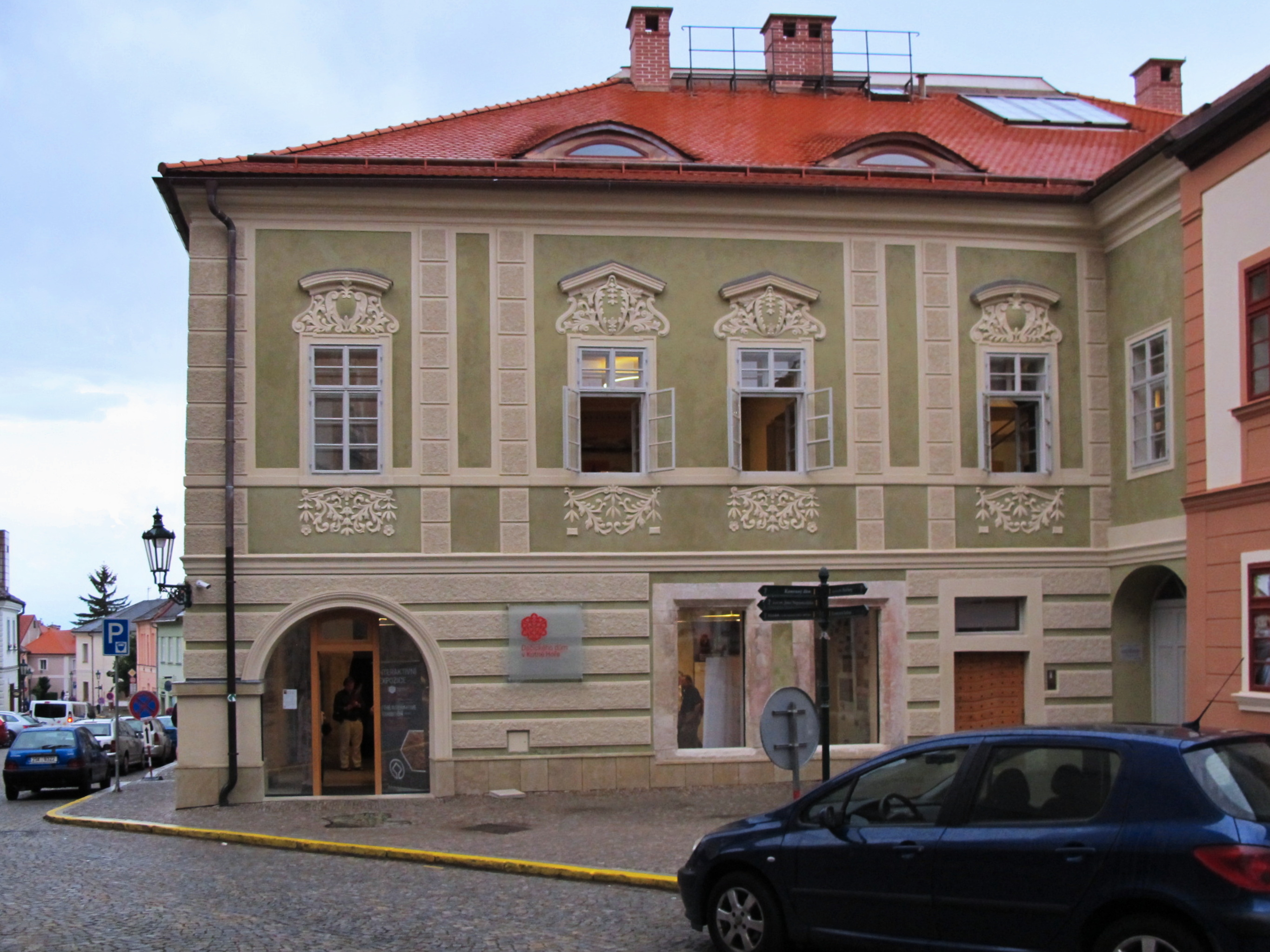 Dům čp. 41, Komenského náměstí 41/23, Vnitřní Město, Kutná Hora.